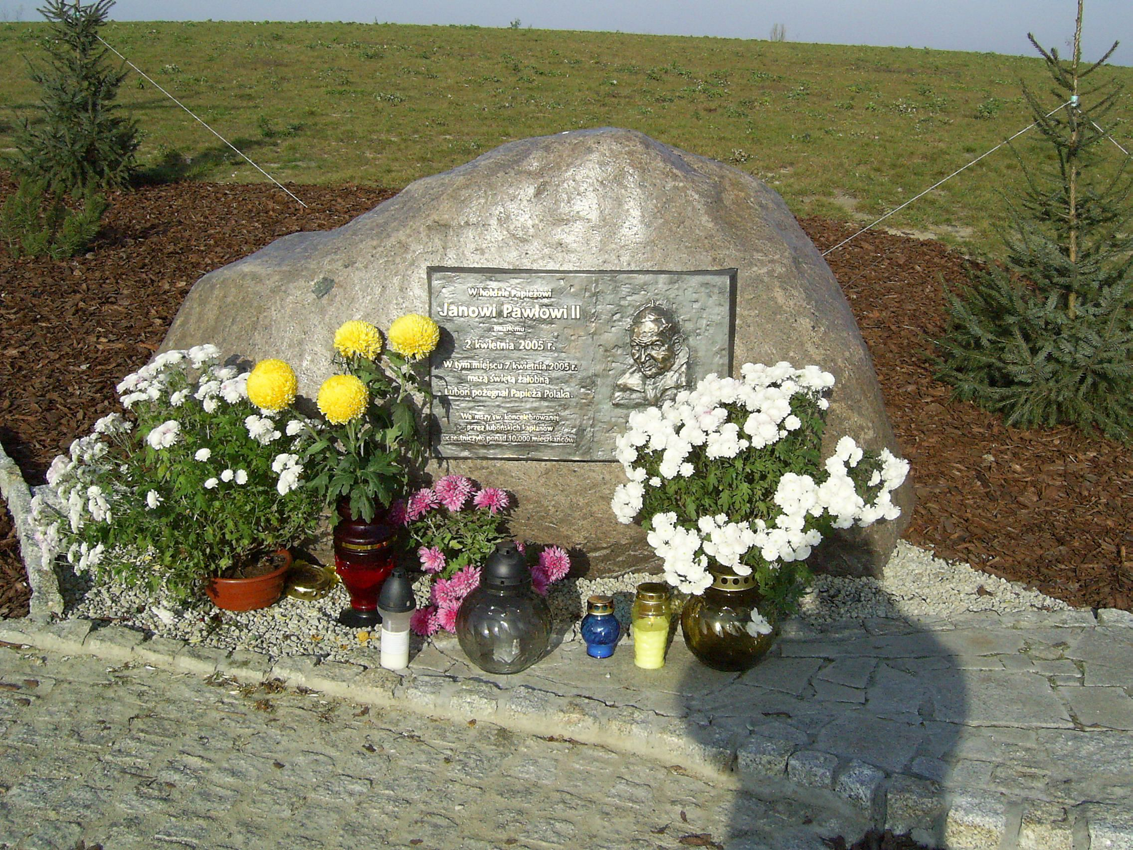 Kamień z tablicą pamiątkową złożoną 2 kwietnia 2005 roku w hołdzie papieżowi Polakowi Janowi Pawłowi II